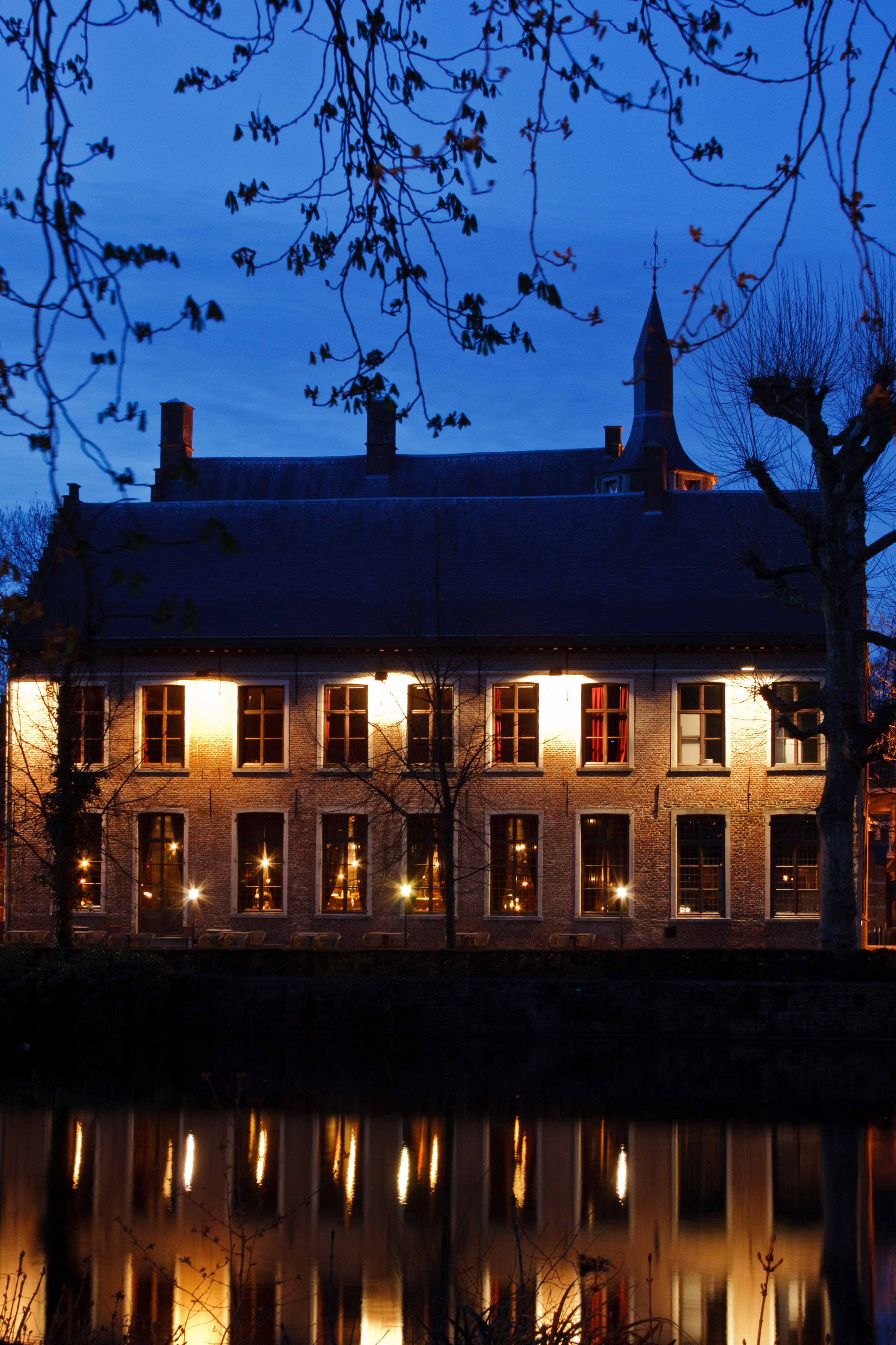 Kasteel Walburg tijdens het blauwe uur, Sint-Niklaas